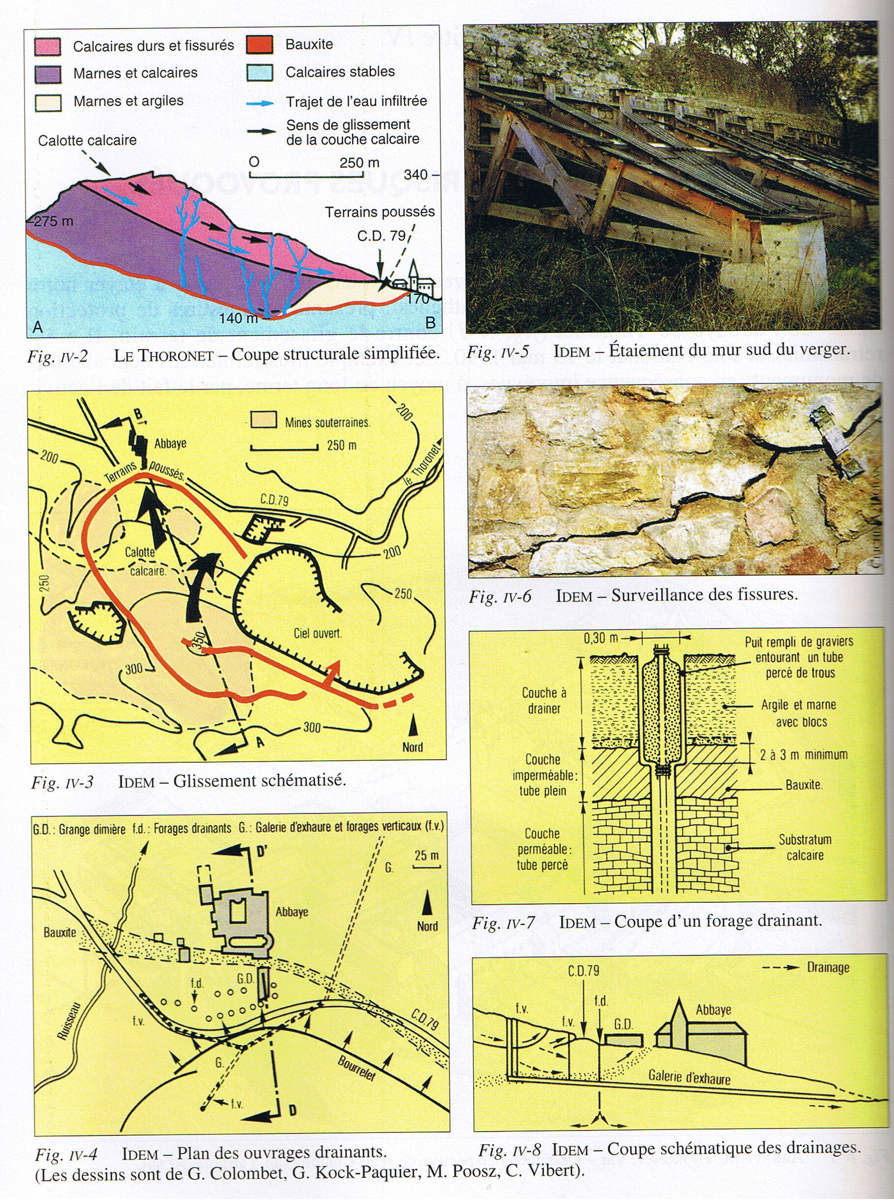 Abbaye du Thoronet (Var). Les mécanismes du glissement de terrain affectant l’abbaye du Thoronet et le remède appliqué par un drainage. Cet exemple nous montre qu’aujourd’hui, les techniques traditionnelles maintenues par le service des monuments historiques et les entreprises et artisans spécialisés ne sont pas toujours suffisantes pour assurer la sauvegarde d’un édifice ou d’un site, mais qu’il faut aussi l’apport des techniques les plus modernes en matière de génie civil (La conception et la maîtrise d’œuvre des travaux ont été confiés au bureau Coyne et Bellier après un appel d’offres sur concours de projets lancé par la Conservation régionale des monuments historiques de Provence-Alpes-Côte d’azur en 1987. Les travaux ont été exécutés par la société MIGEC-SOMAFER. Source : L’Encyclopédie du patrimoine, de René Dinkel, pages 106 à 107 Le Glissement de terrain et pages 55 à 61 Les conditions d'exécution à l'abbaye du Thoronet, Les Encyclopédies du patrimoine, Paris septembre 1997.